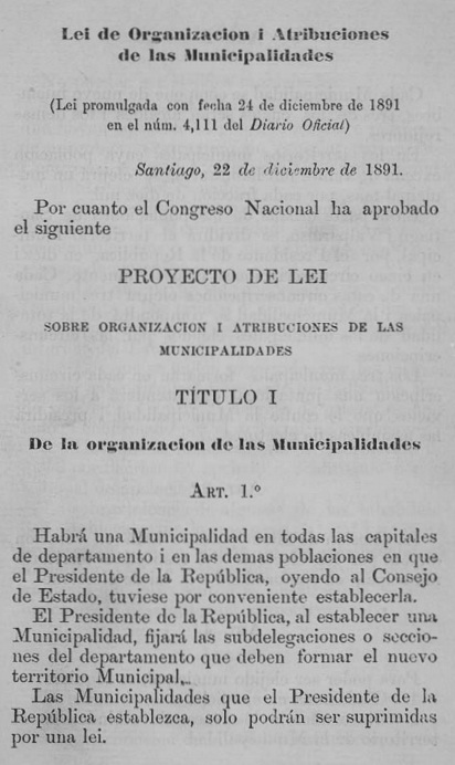 Imagen de la página 261 del Boletín de Leyes y Decretos del Gobierno de Chile de 1891, Ley 4.111 llamada Ley de la Comuna Autónoma